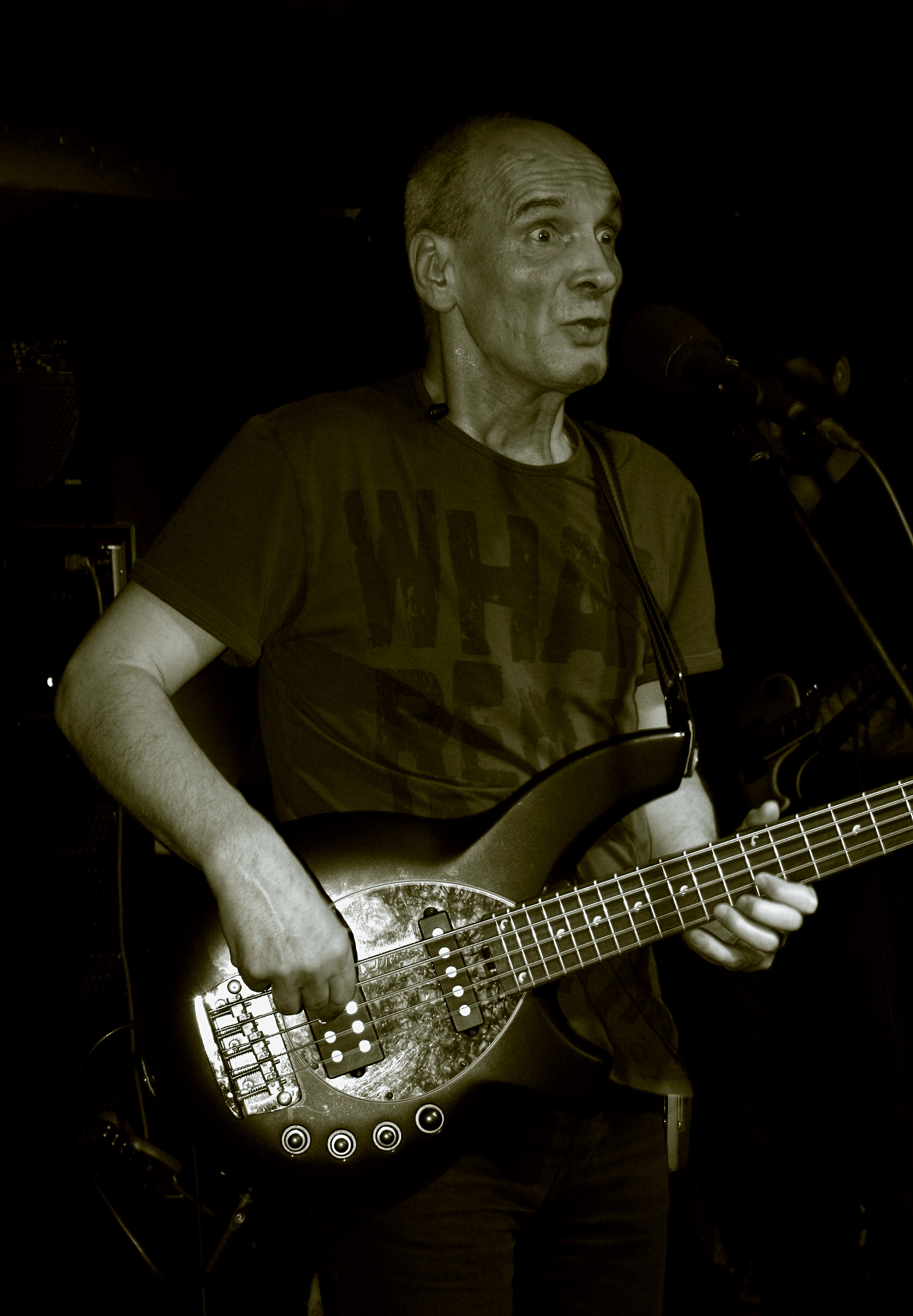 Lech Janerka w Klubie Zero, Częstochowa